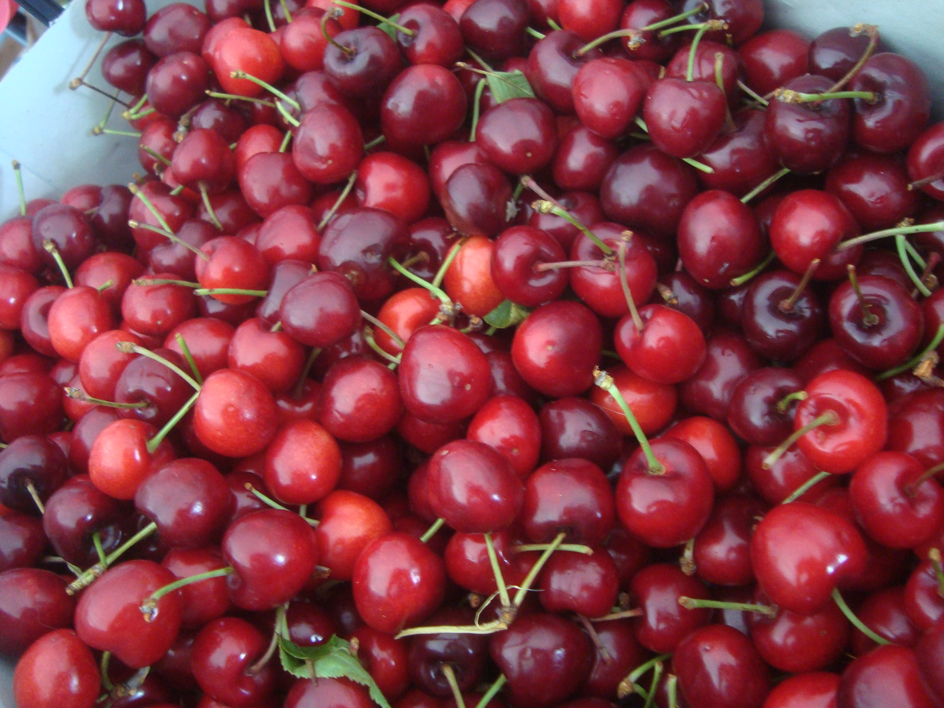 Cerezas de la Salzadella.